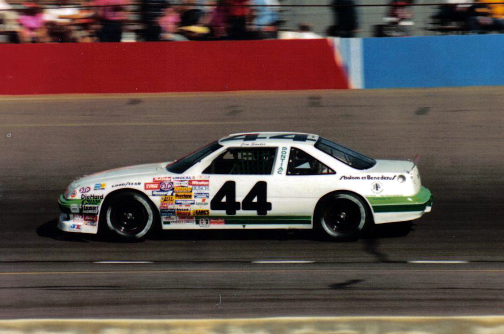 Jim Sauter #44 at Phoenix in 1989.